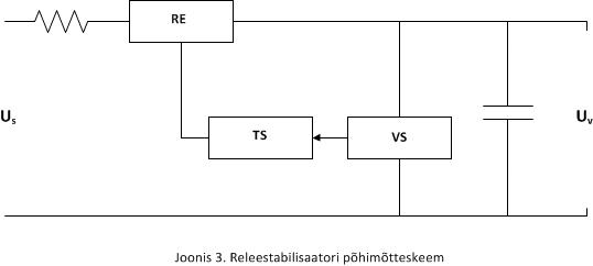 Releestabilisaatori põhimõtteskeem